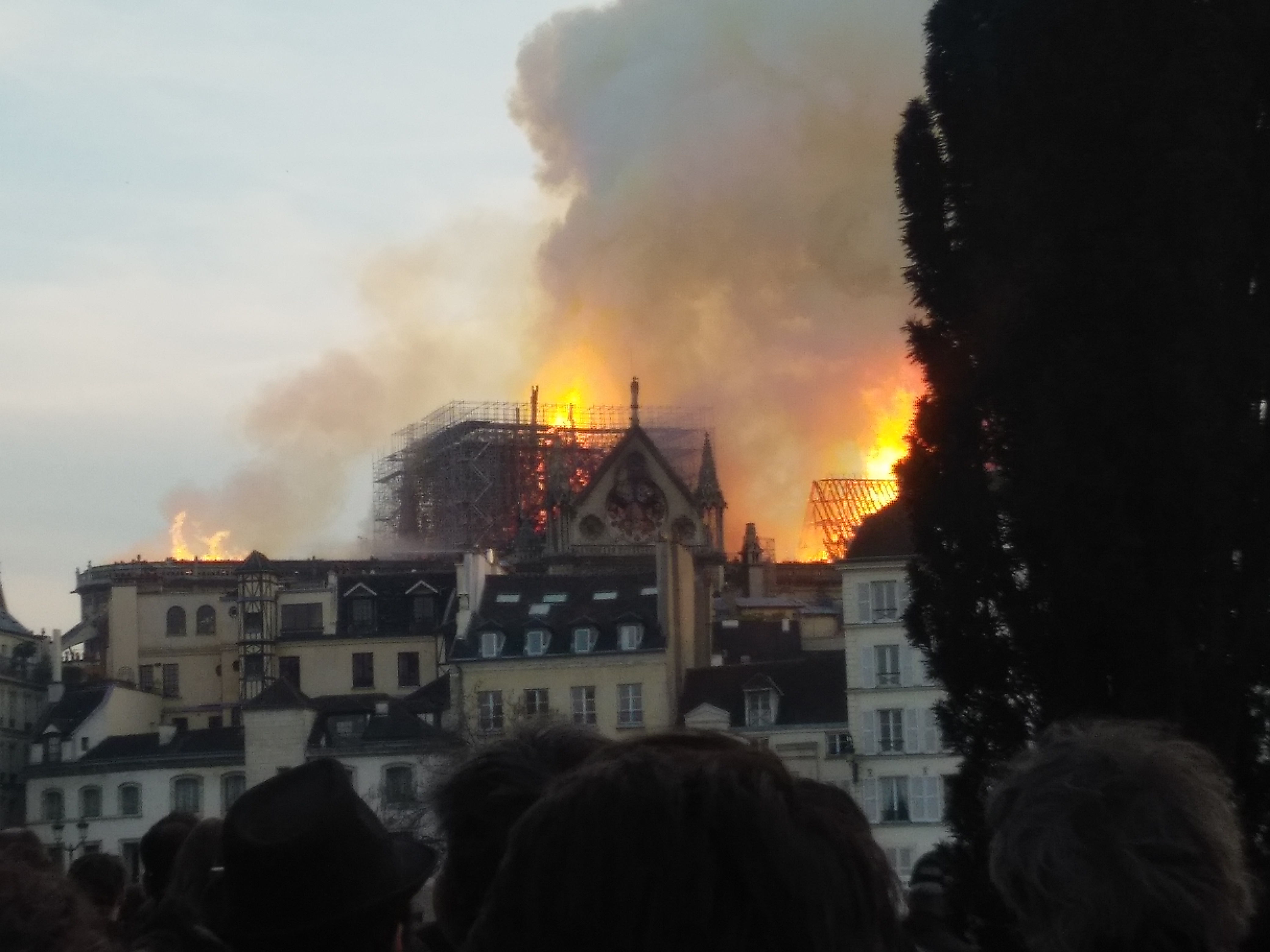 Incendie de Notre-Dame-de-Paris 15 avril 2019